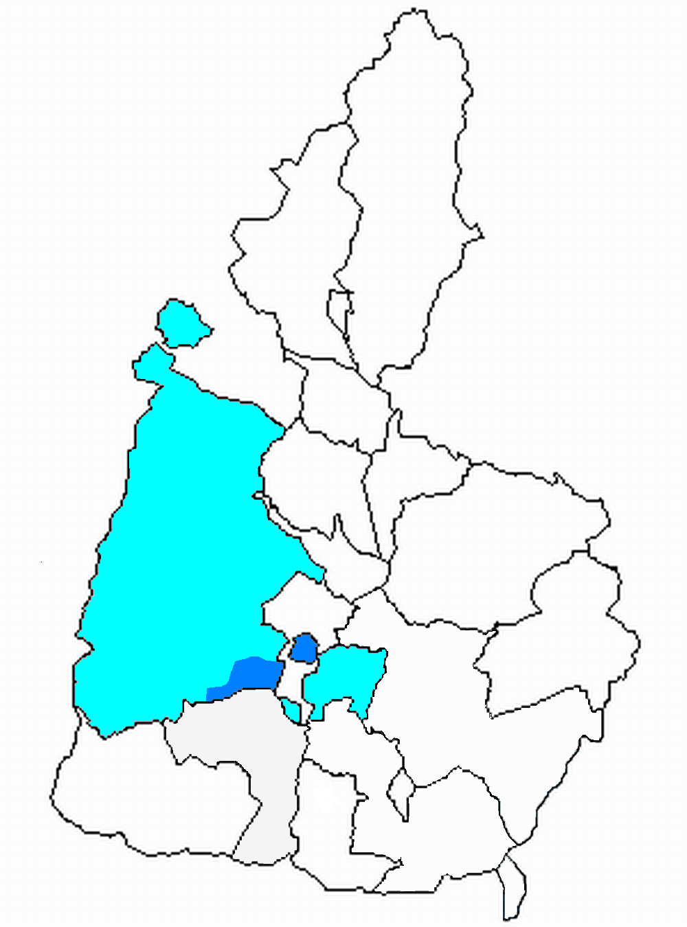 Mapa del Pallars Jussà amb l'antic terme municipal de Tremp assenyalat.